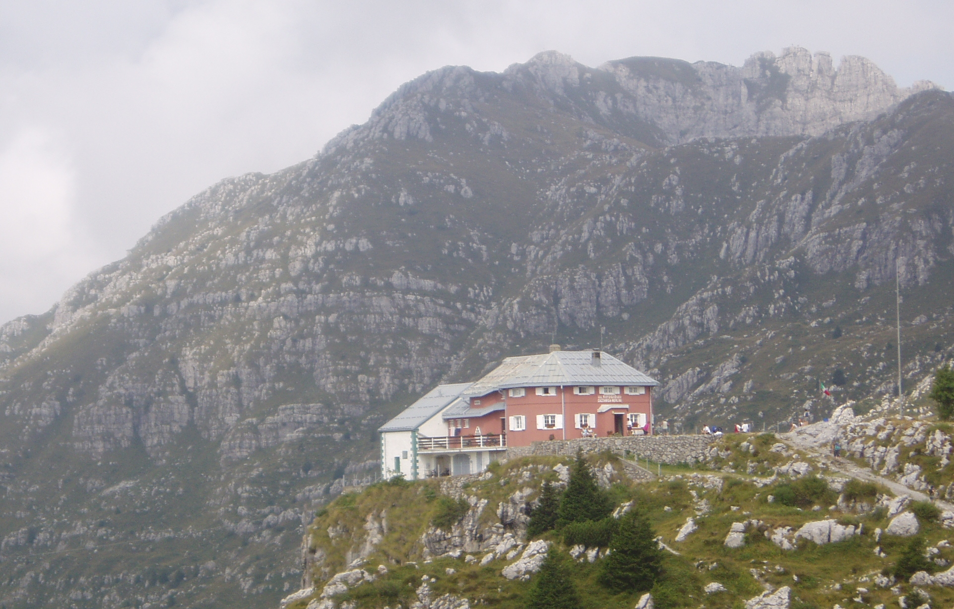 Fotografia del rifugio Cazzaniga-Merlini